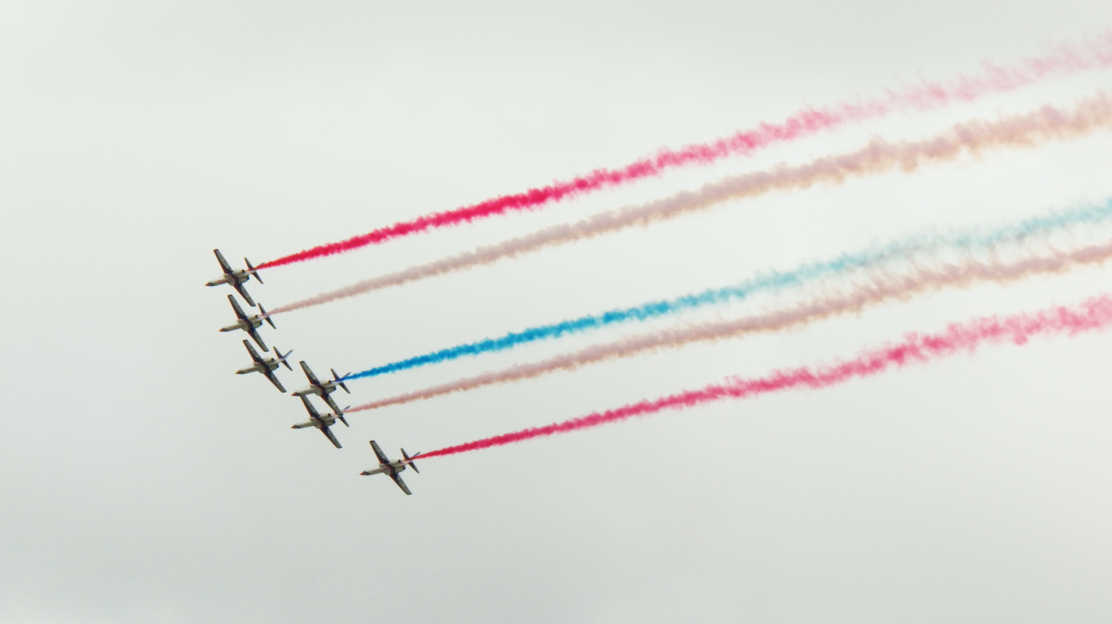 雷虎特技飛行小組新竹空軍基地營區開放活動表演的六機編隊。